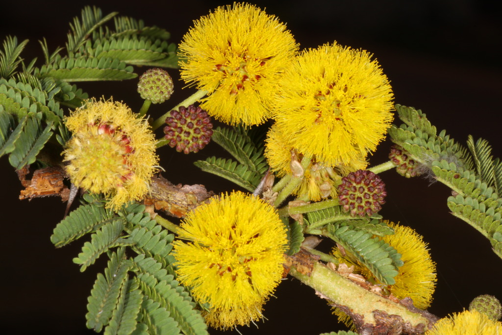 Pretoria Botanical Garden